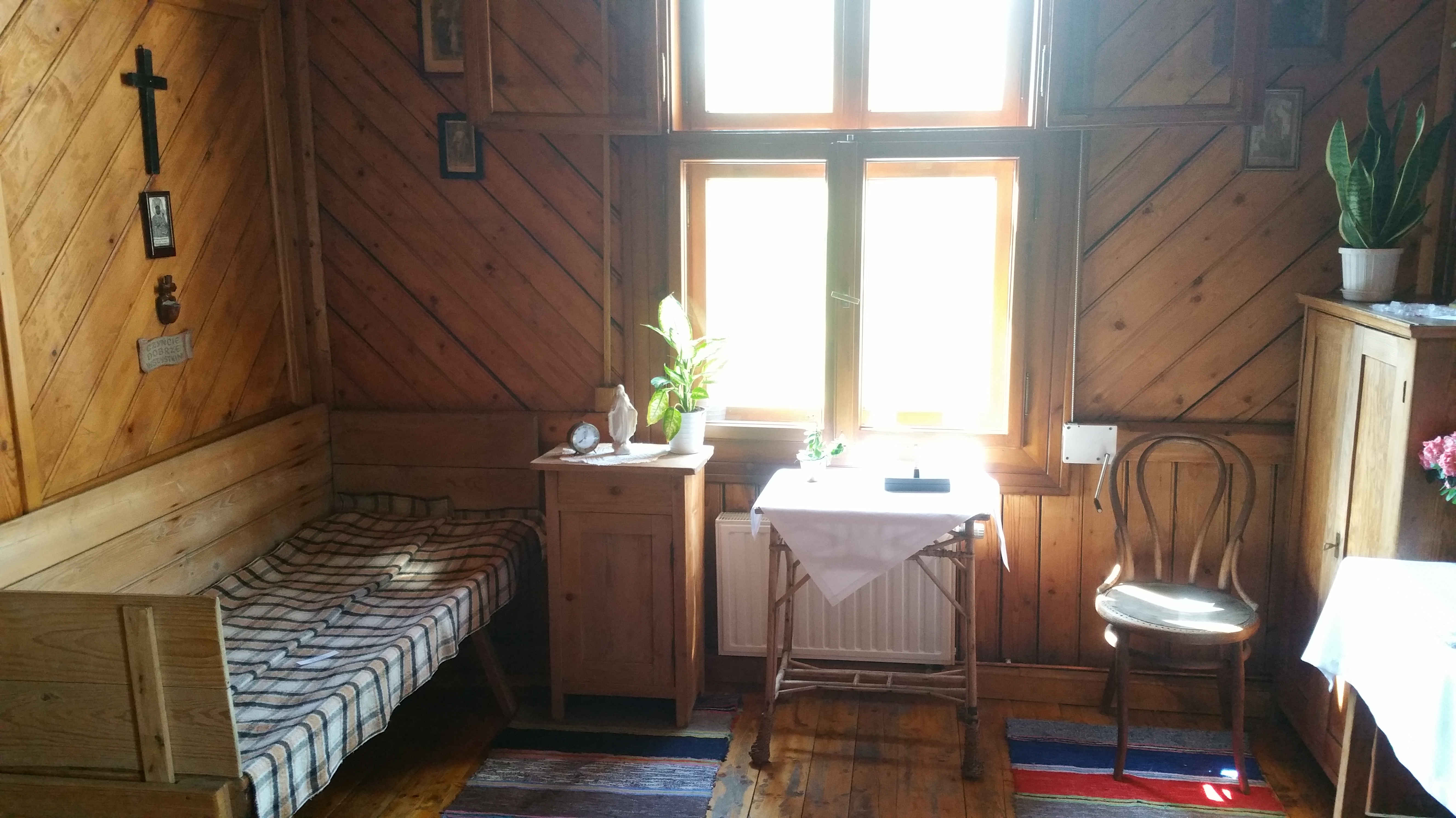 Sterbezimmer der seligen Bernardyna Maria Jabłońska im Mutterhaus der Albertiner-Schwestern in Kraków (Krakau)